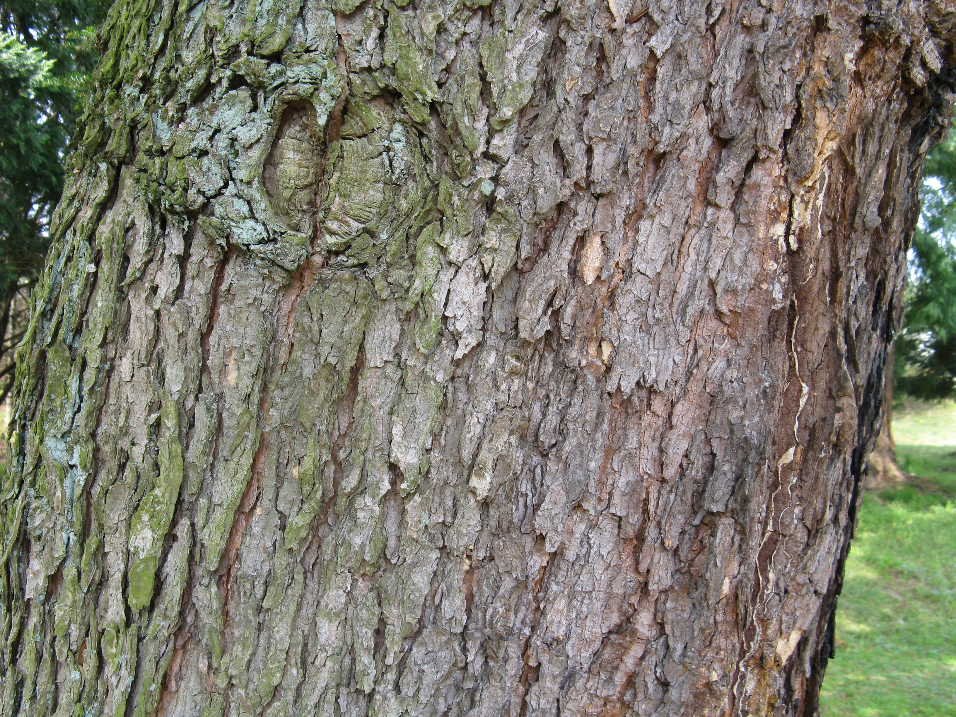 Scientific name Keteleeria davidiana